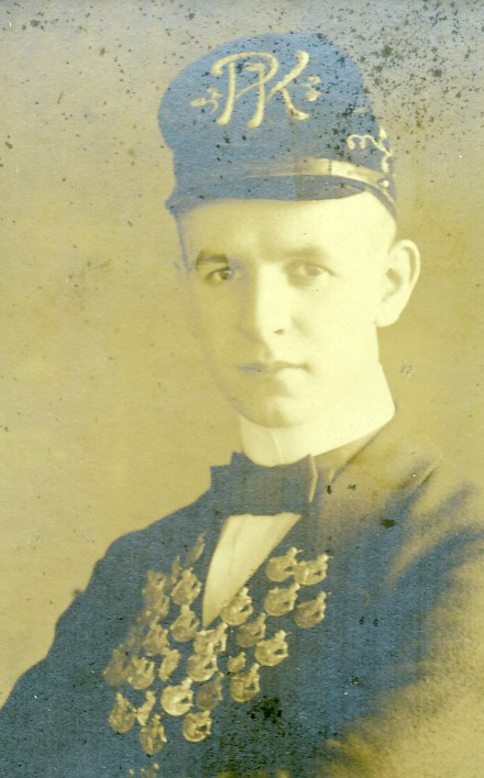 Ein Student um die Jahrhundertwende mit Alberten auf dem Brever